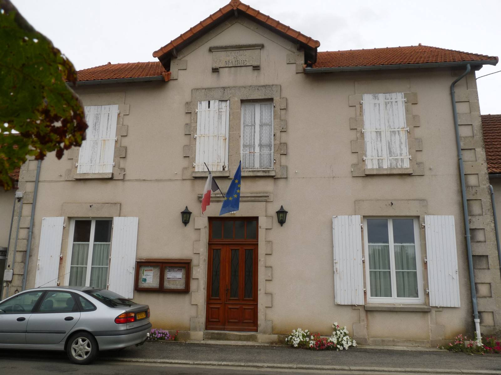 mairie de Benest, Charente, France